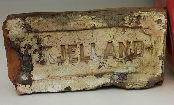 En murstein fra Alexander Lange Kielland teglverk på Madla, i det som nå er Stavanger. Han brukte på denne tiden skrivemåten Kjelland.